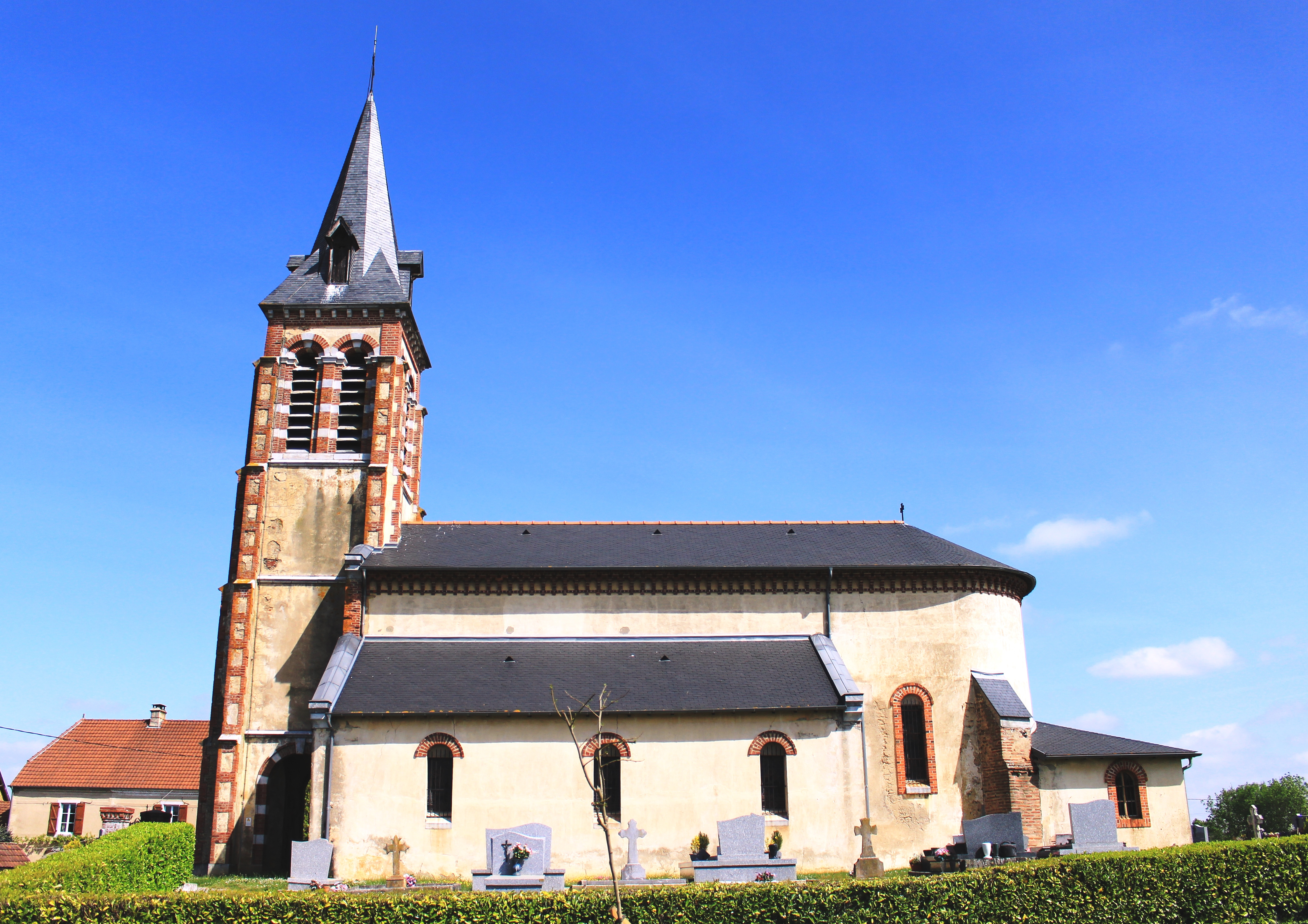 Église Saint-Étienne d'Escaunets (Hautes-Pyrénées)